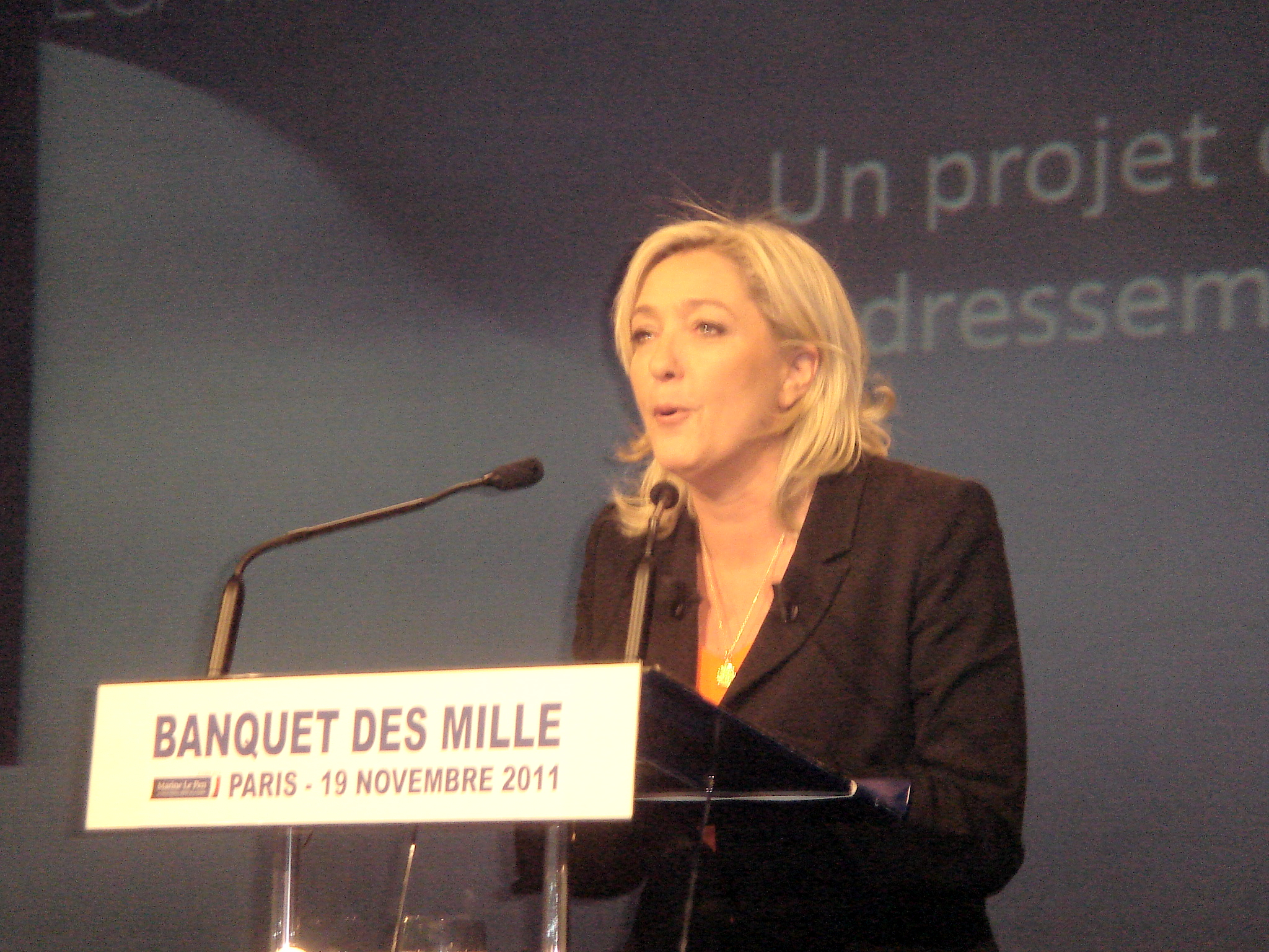 Présentation du programme présidentiel de Marine Le Pen, samedi 19 novembre 2011, Banquet des mille, salle Équinoxe, Paris.